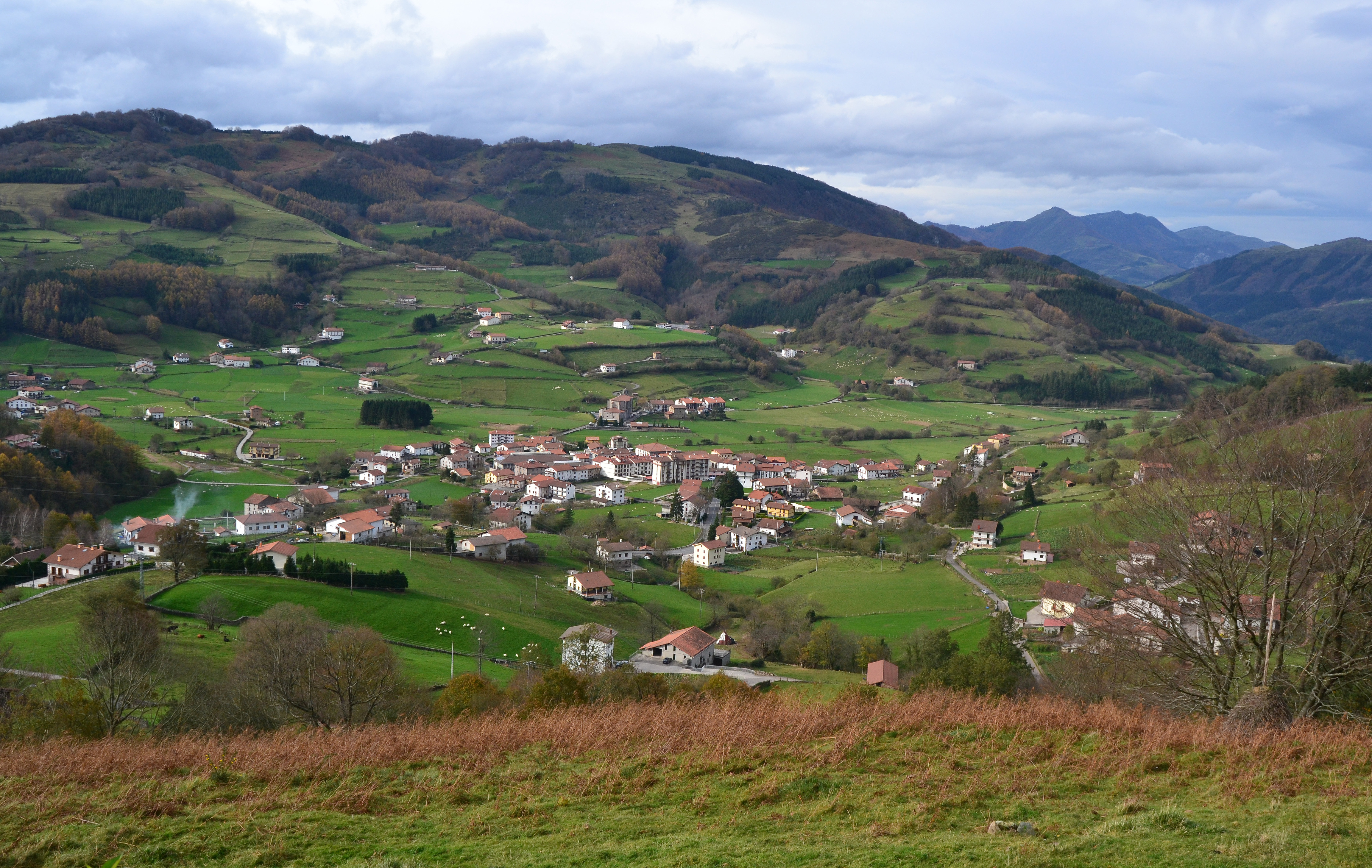 Berastegi, Gipuzkoa. Euskal Herria. Berastegi, Gipuzkoa. Basque Country.